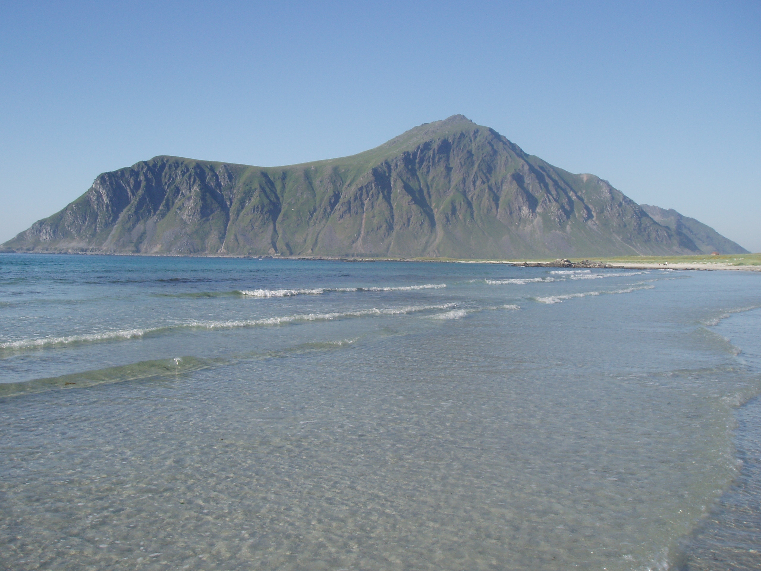 Skagsanden in Lofoten